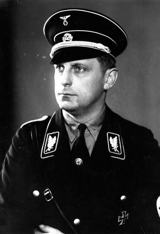 Werner Lorenz Scherl Bilderdienst Berlin Lorenz, Werner, SS-Brigadeführer 23497-33 Fotograf: Fritz Krauskopf, Königsberg, 1933 [Werner Lorenz, SS-Brigadeführer, Porträt] Abgebildete Personen: Lorenz, Werner: SS-Obergruppenführer, Leiter der Volksdeutschen Mittelstelle, Deutschland